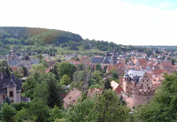 Image of Büdingen Beschreibung: Blick auf die Büdinger Altstadt Quelle: selbst fotografiert Fotograf oder Zeichner: --Sven Teschke 11:20, 17. Mai 2004 (CEST) Lizenzstatus: GNU FDL